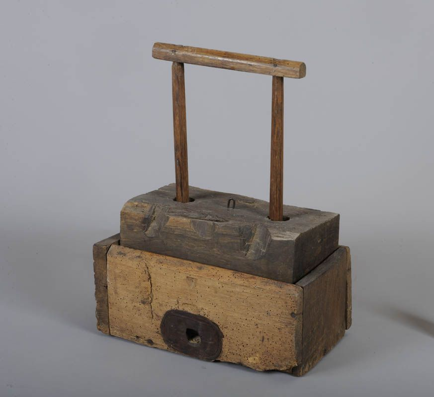 Bon état général ; 11/10/2010; Original caption: “Bac en bois muni de 2 montats verticaux. Un bloc de bois (parallèpipède) coulisse sur ces deux montants lors de l’activation du piège. Ce poids est en position haute lorsque le piège est armé. Présence d’un orifice (2x2 cm) au centre, en bas sur la face avant. Le poids (partie mobile) comporte un pontet sur le dessus.”